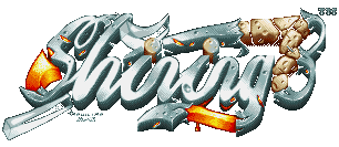 Logo der Gruppe Shining8 erstelle von Newline/S8